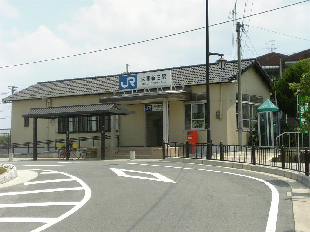 JR大和新庄駅舎